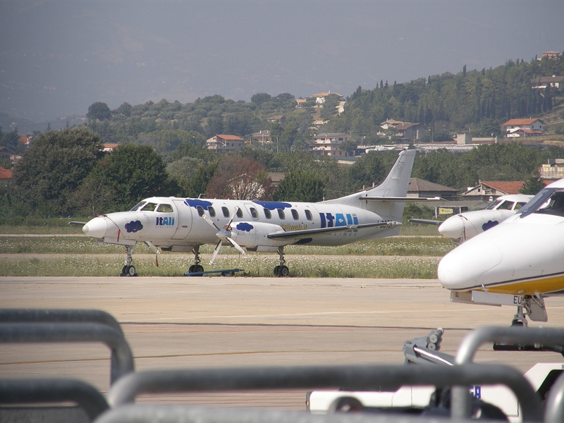 Pescara Airport